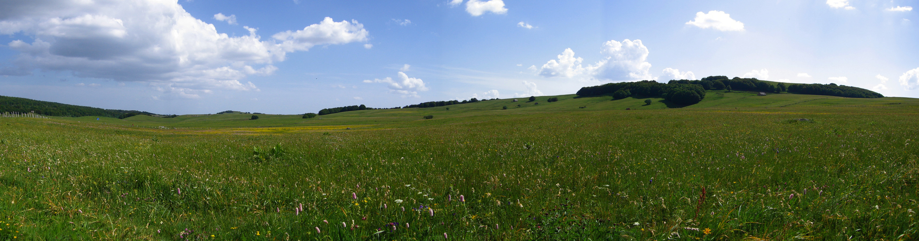 Aubrac - Bonnecombe